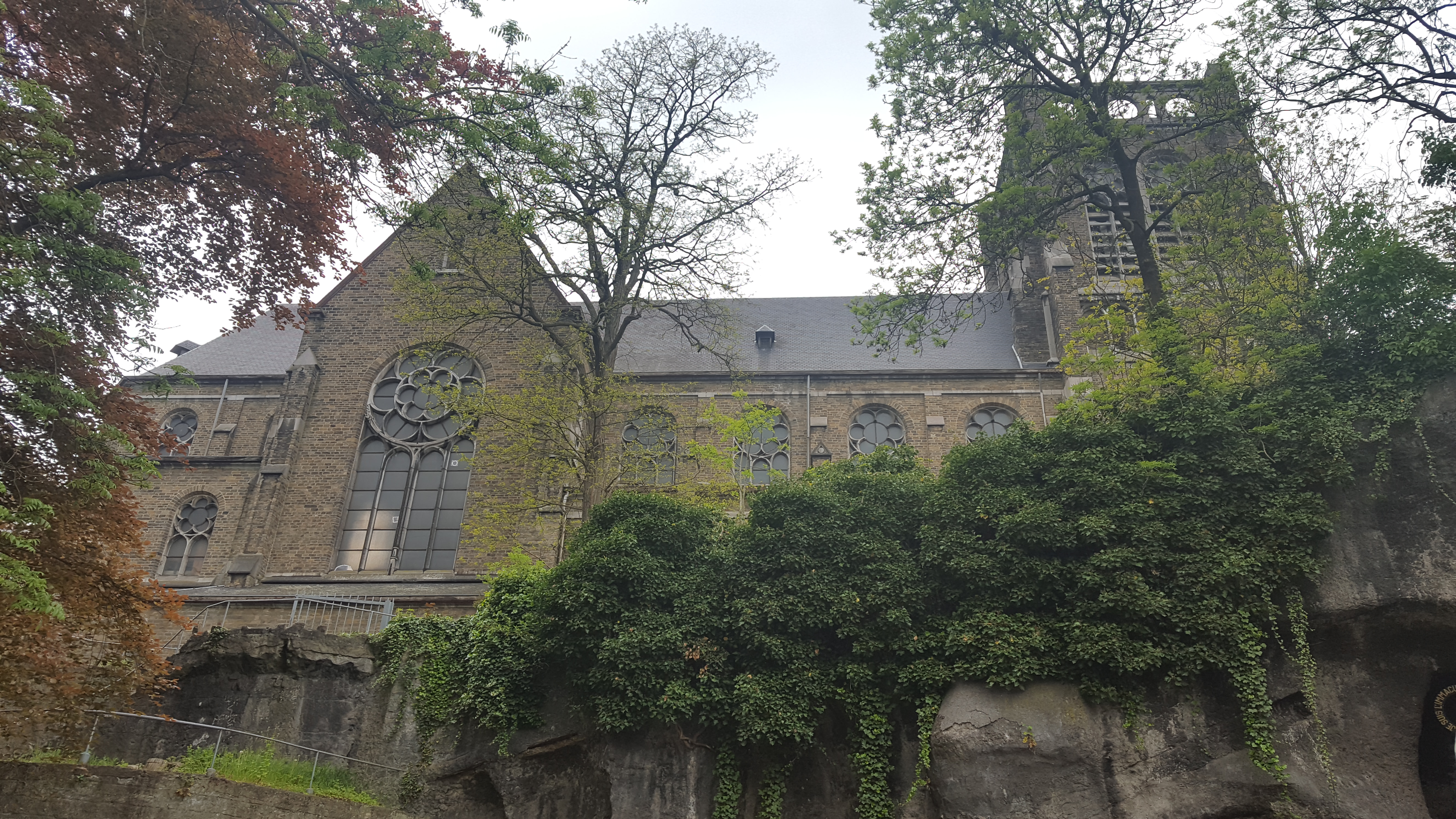 Église Notre-Dame de Lourdes à Le Bouhay, Bressoux, Belgique